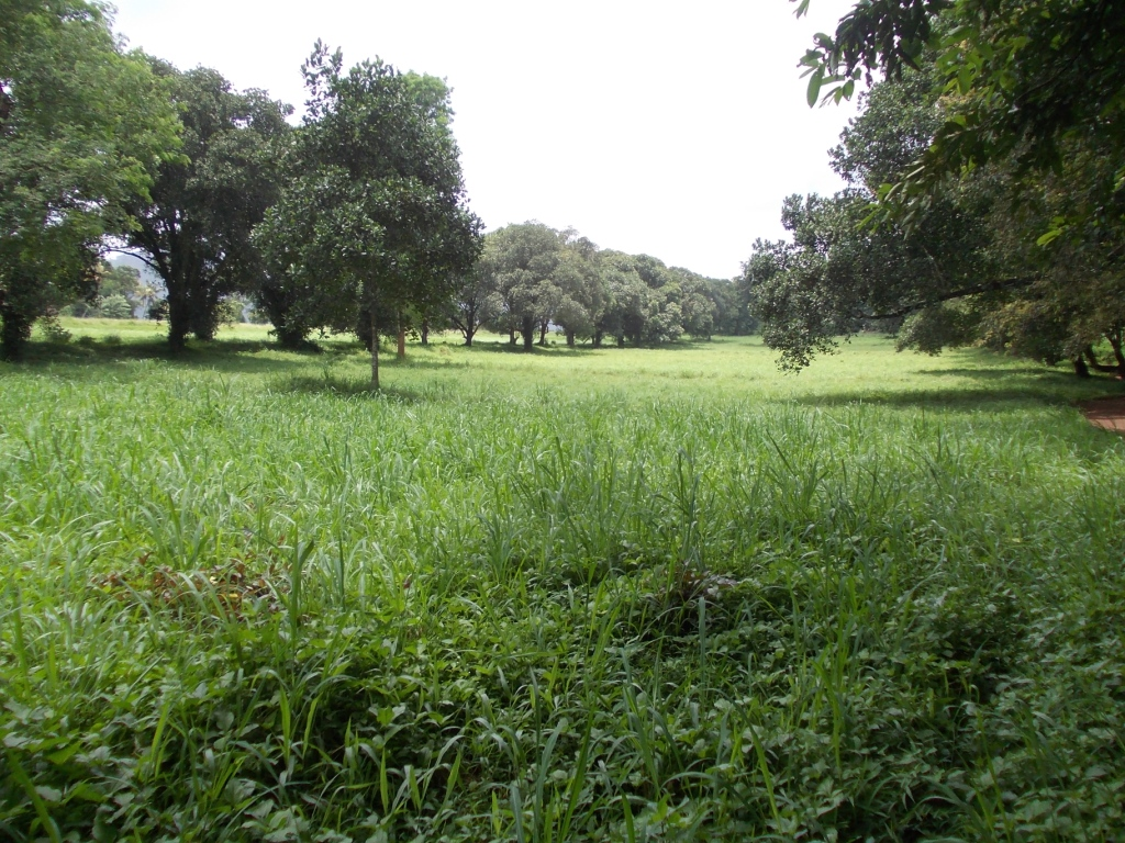 കന്നുകാലി ഗവേഷണകേന്ദ്രം, തിരുവിഴാംകുന്ന്